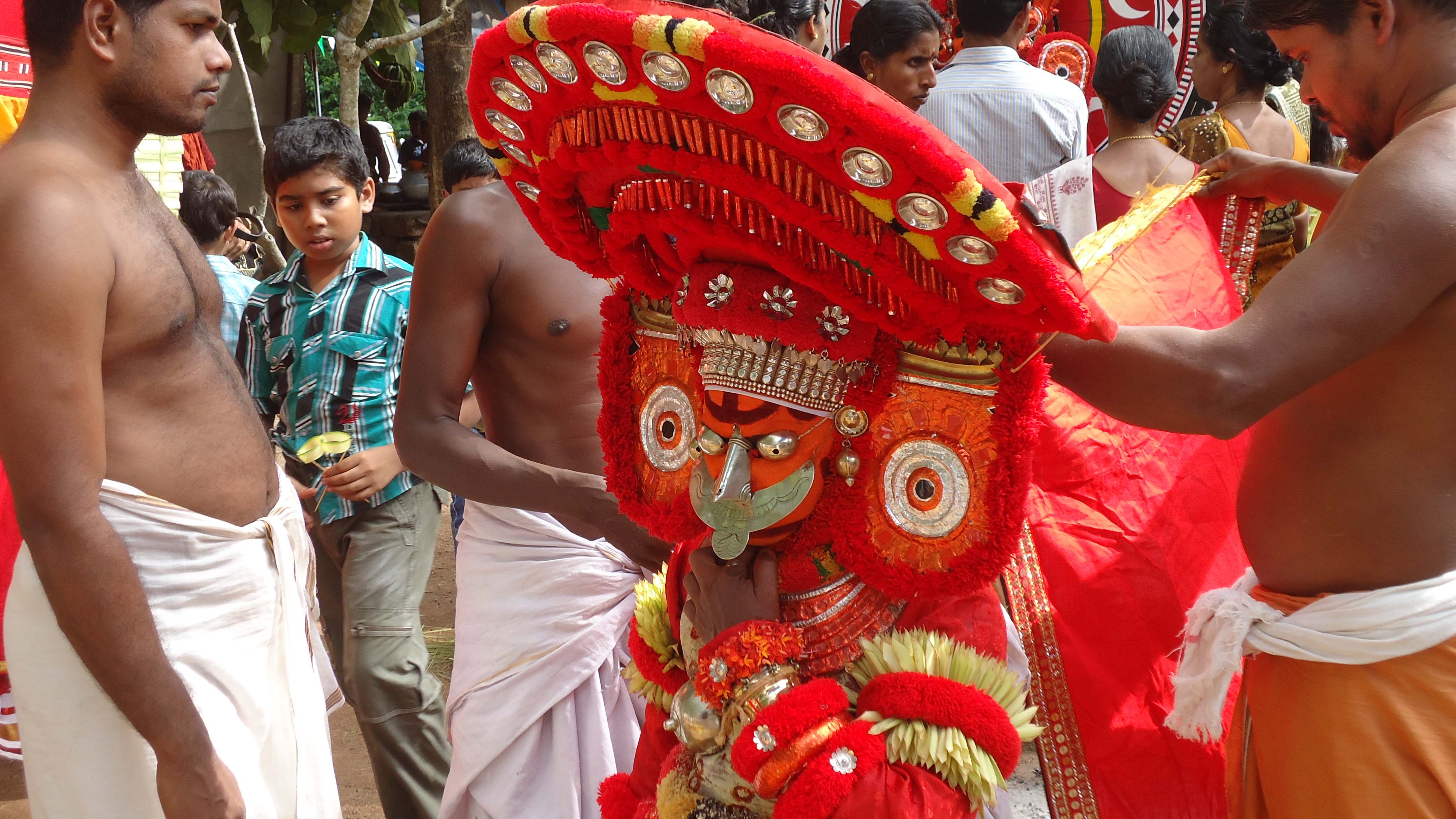 ഇ തെയ്യം നാടു വലം വച്ച് അരി ദക്ഷിണ മേടിച്ചു കൊണ്ട് വരുന്ന ഒരു ആചാരം ഉണ്ട് .വണ്ണാന്‍ സമുദായത്തില്‍ പെട്ടവര്‍ ആണ് ഇ തെയ്യം കെട്ടുന്നത്